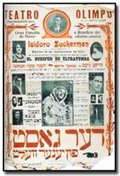 Buenos Aires +/- 1910, teatro idish 'Olimpo'.